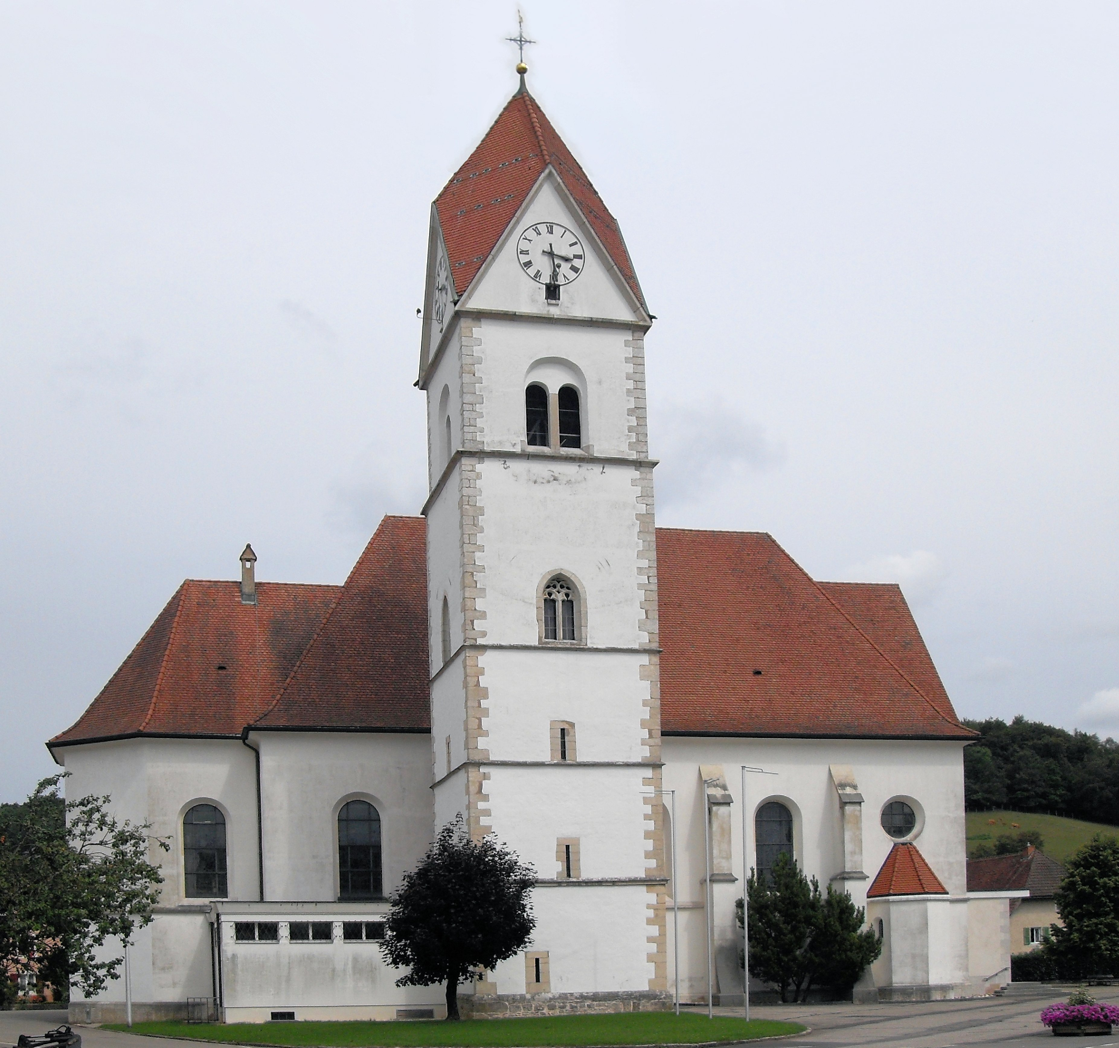 L'église Saint-Pierre-et-Paul de Boncourt, Suisse